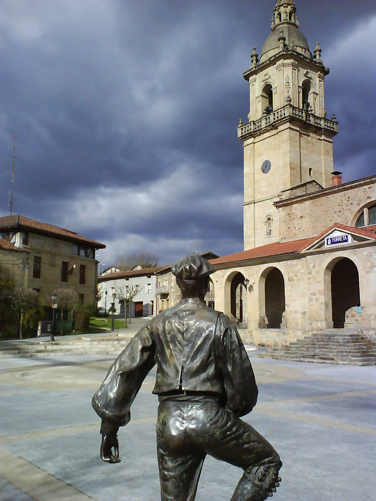 Vista general de la Plaza San Miguel de Iurreta, Vizcaya(País vasco) (España).